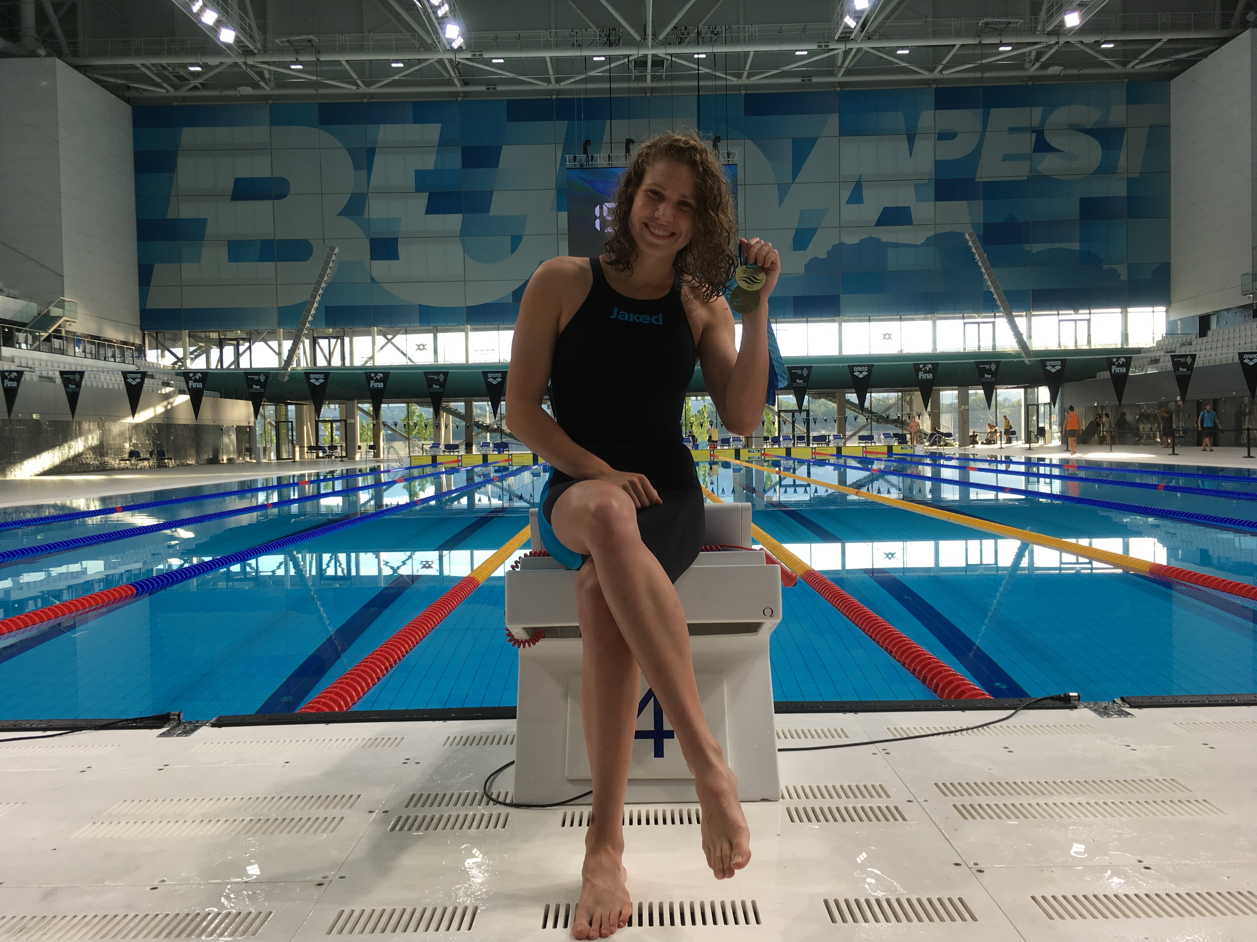 50 mwll Budapest open